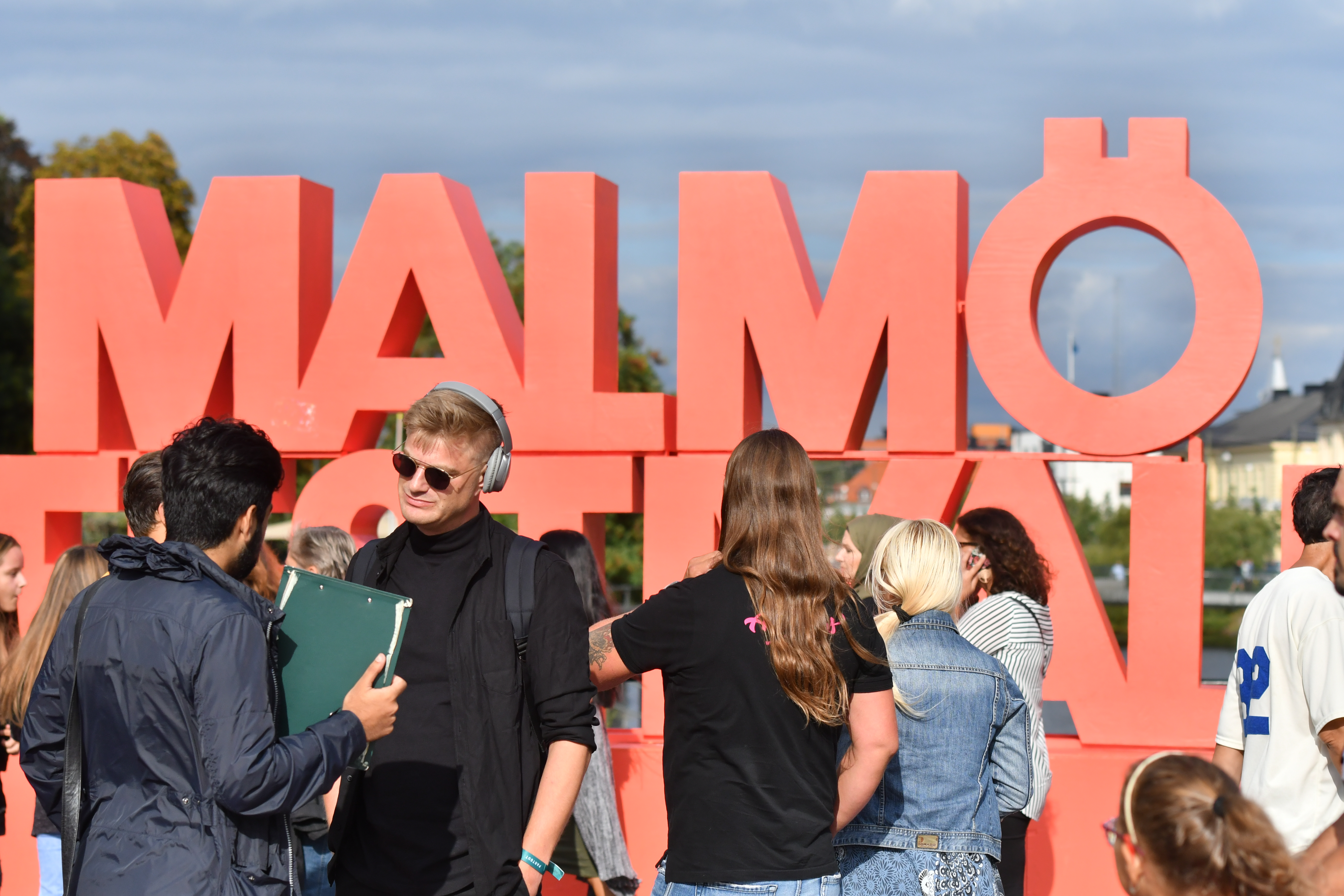 Folkvimmel på Malmöfestivalen.